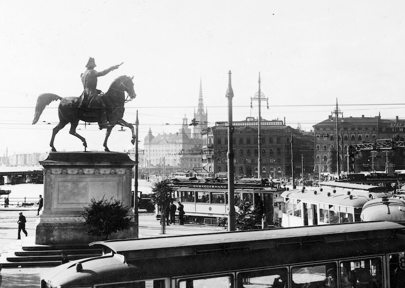 Slussen med den trafikordning som började den 1.4.1922 vid sammankopplingen av norr- och söderlinjerna Karl Johans torg. Statyn vid torget.